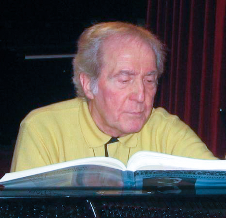 Aldo Ciccolini, italian-french pianist. (dec. 2005) photo:Ziga 08:45, 6 June 2006 (UTC)